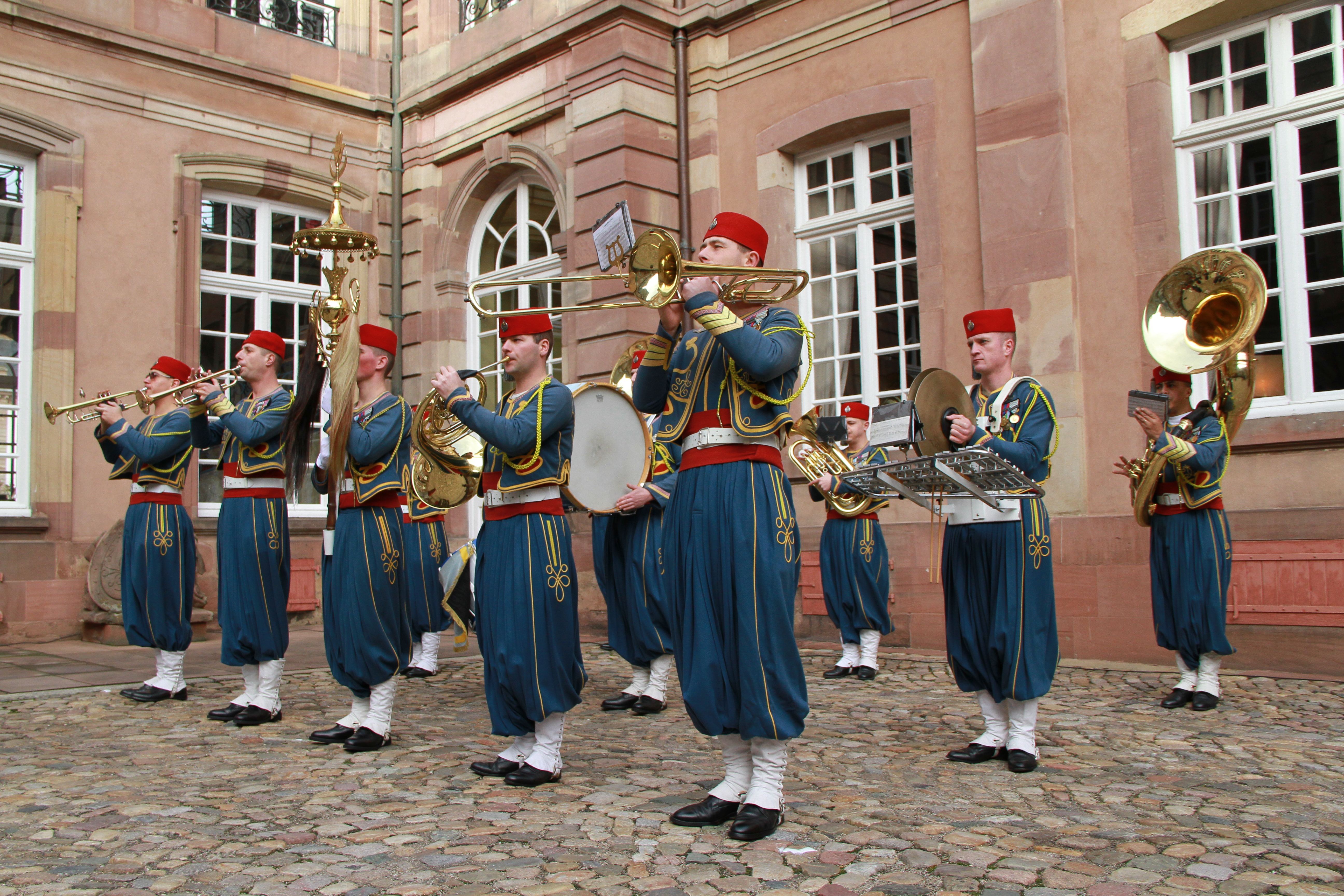 La Nouba du 1er Régiment de Tirailleurs d'Épinal en tenue de Tradition lors de la prise d'armes au Palais du gouverneur militaire de Strasbourg, le 31 janvier 2013, en présence du général Bertrand Ract-Madoux, chef d’état-major de l’armée de terre à l’occasion du retour en France de la Task force Lafayette.